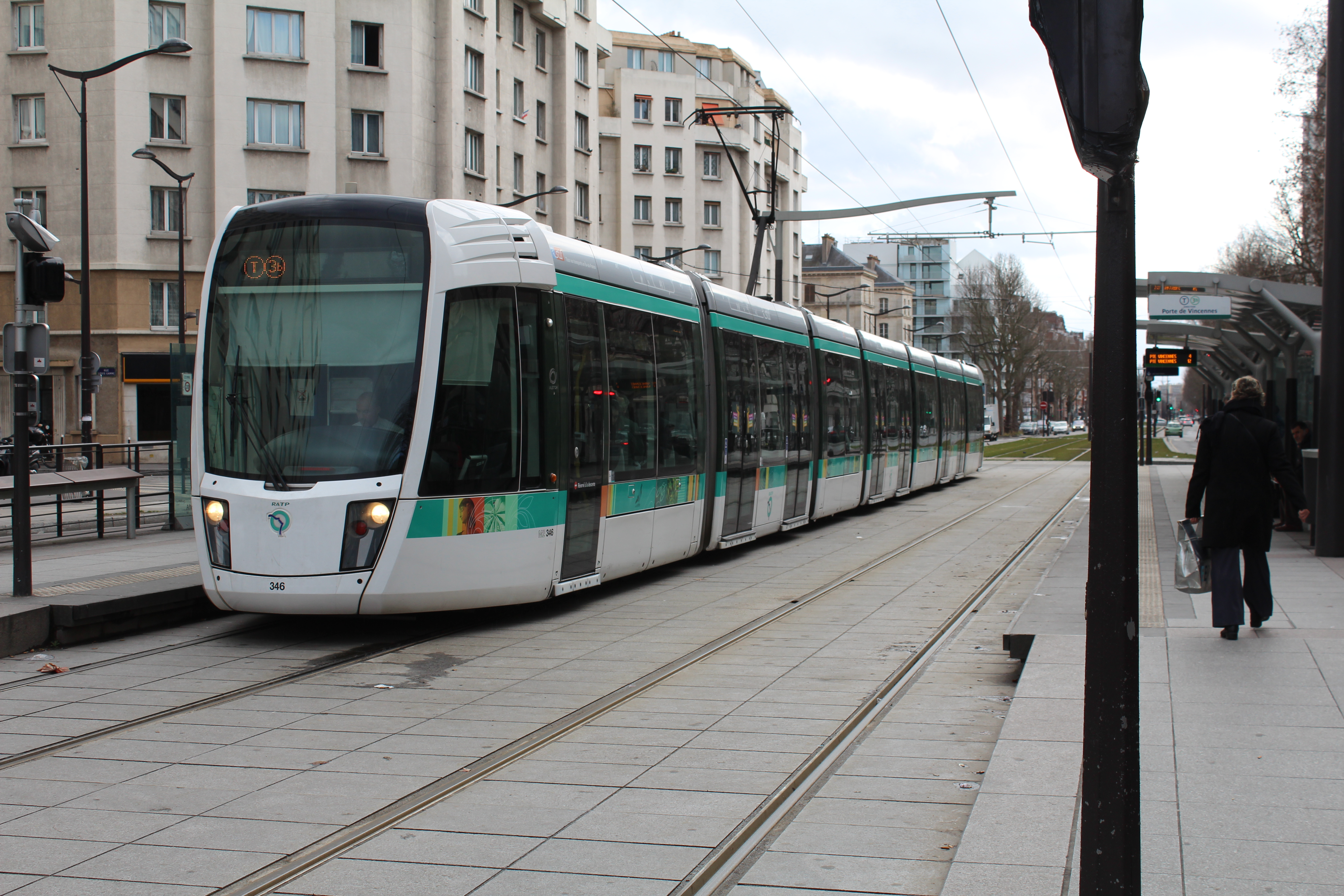 Station de tramway Porte de Bagnolet sur la ligne 3b du tramway d'Île-de-France